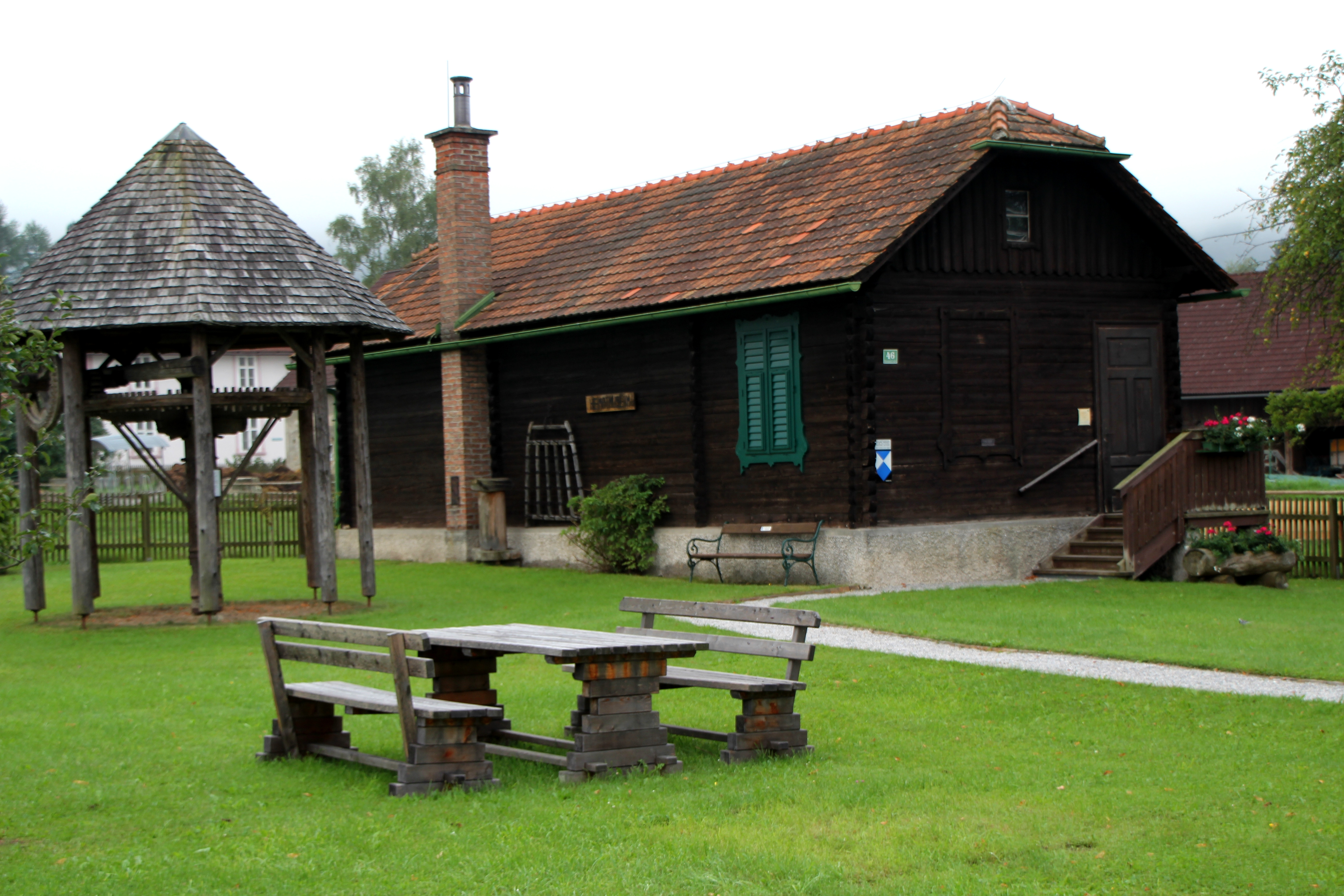 Studierhäusl Peter Roseggers, sog. Almhütte, Krieglach